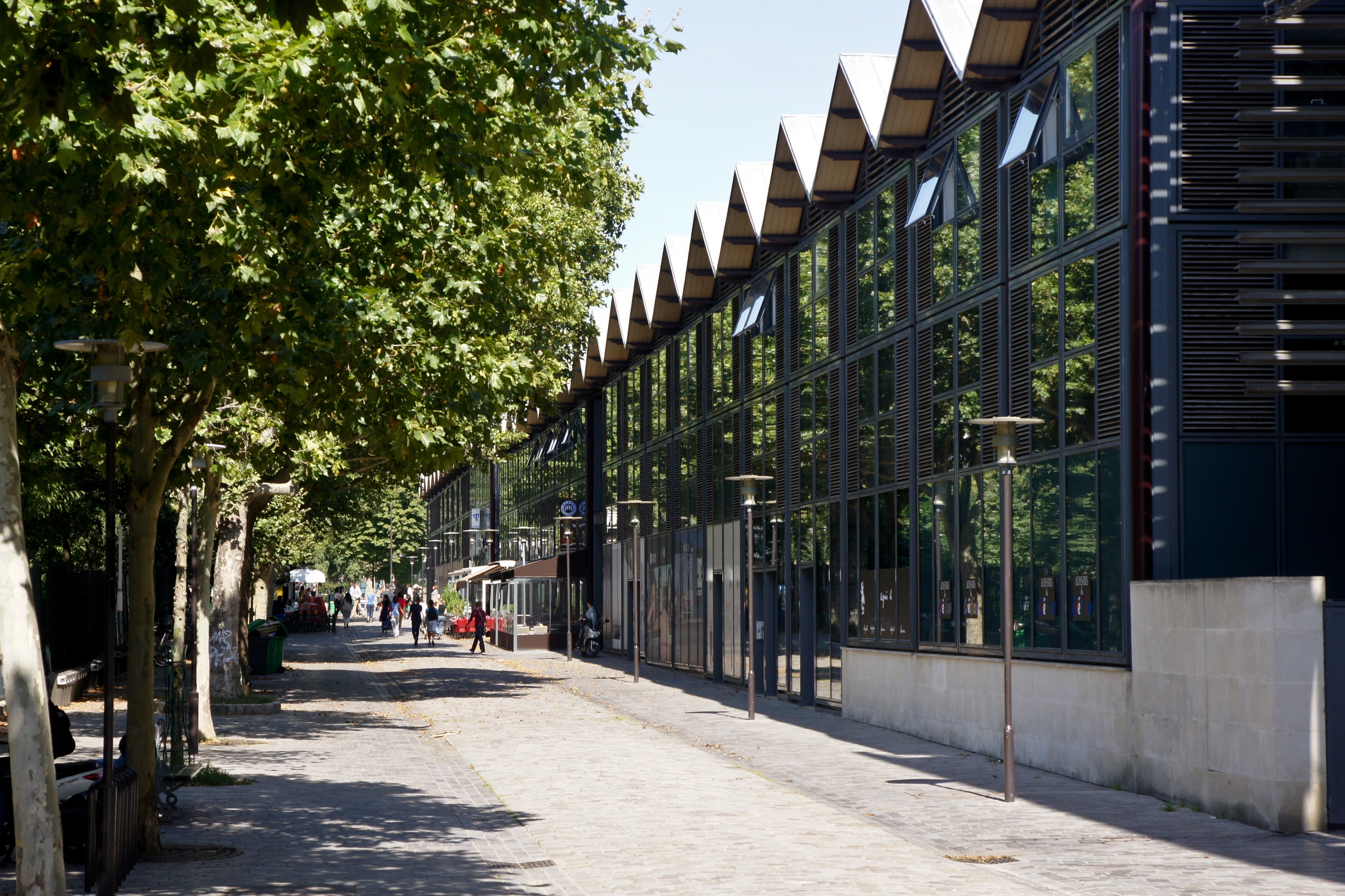 Paris, rue François-Truffaut et Bercy Village.